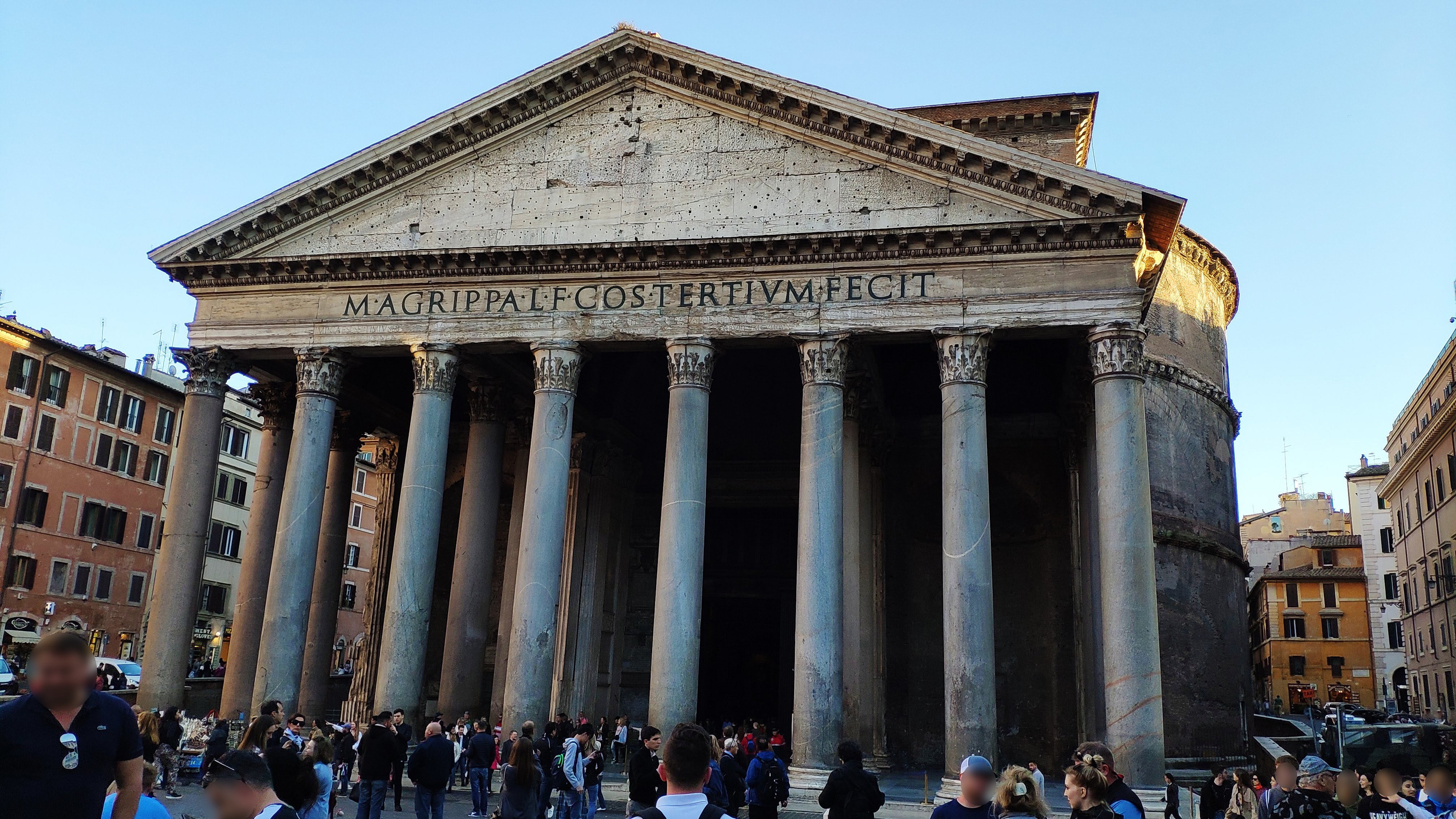 Fachada del Panteón de Roma